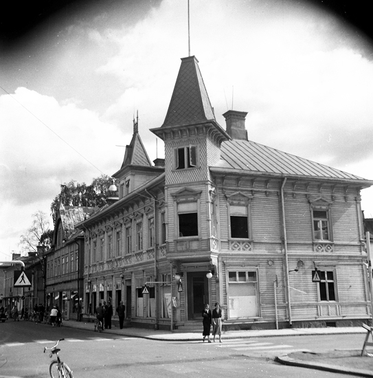 Hus med fina detaljer och ett tornliknande hörn, Nygatan - Trädgårdsgatan i Skellefteå från väster. Foto från 1956.